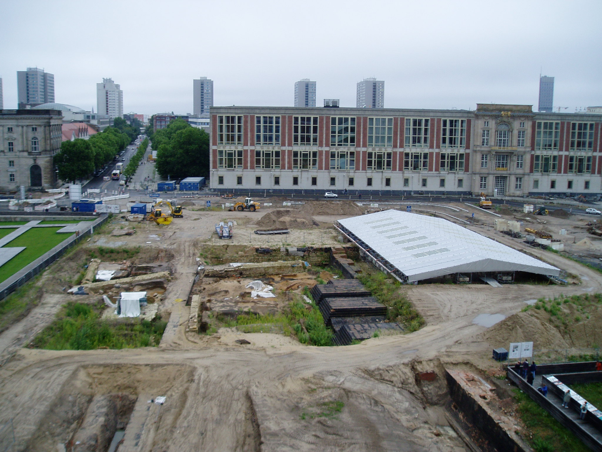 Ausgrabungen am Schloßplatz Berlin, Staatsratsgebäude